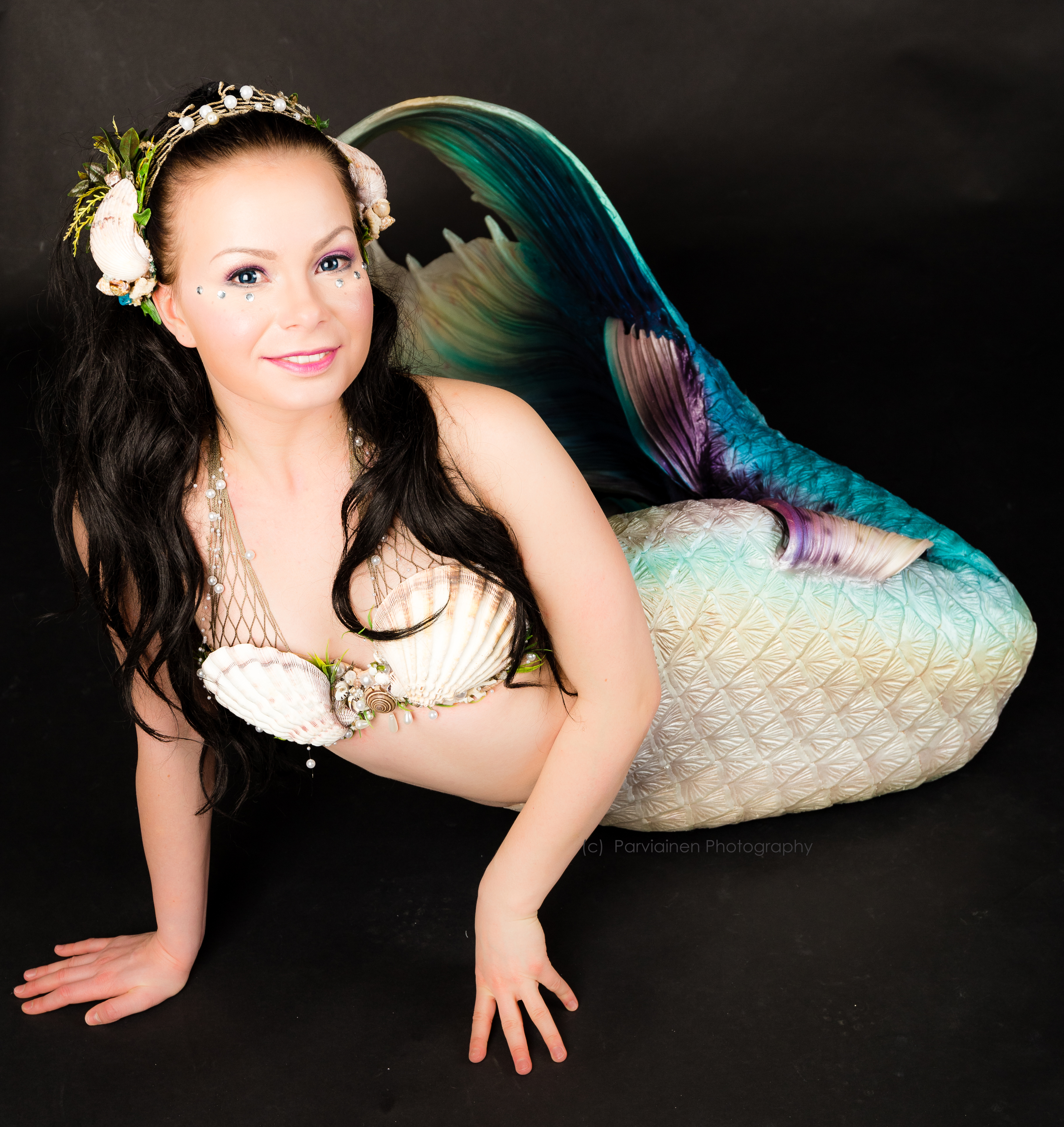 Merenneito Riiana esiintyvä Anni Perttula on Suomen ensimmäinen ammattimerenneito.